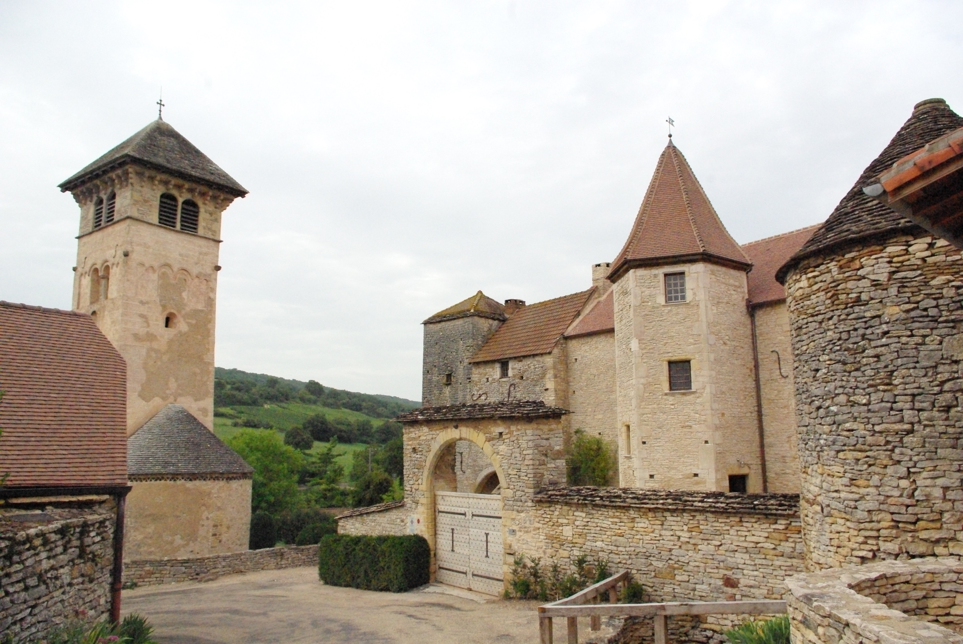 Clocher de l'église et prieuré de Blanot, Saône-et-Loire